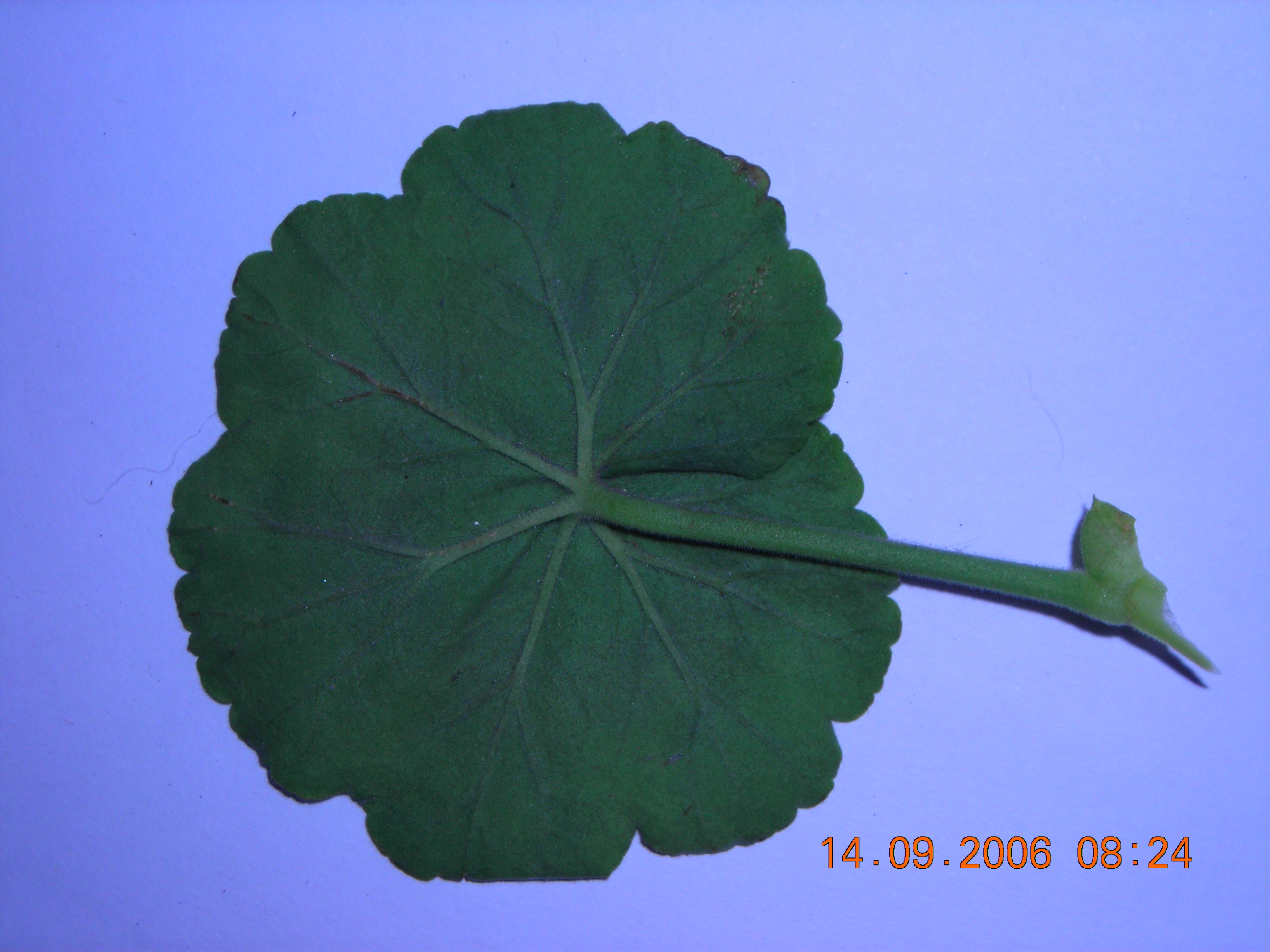 Fotografia de cara posterior de hoja de pelargonium hortorum